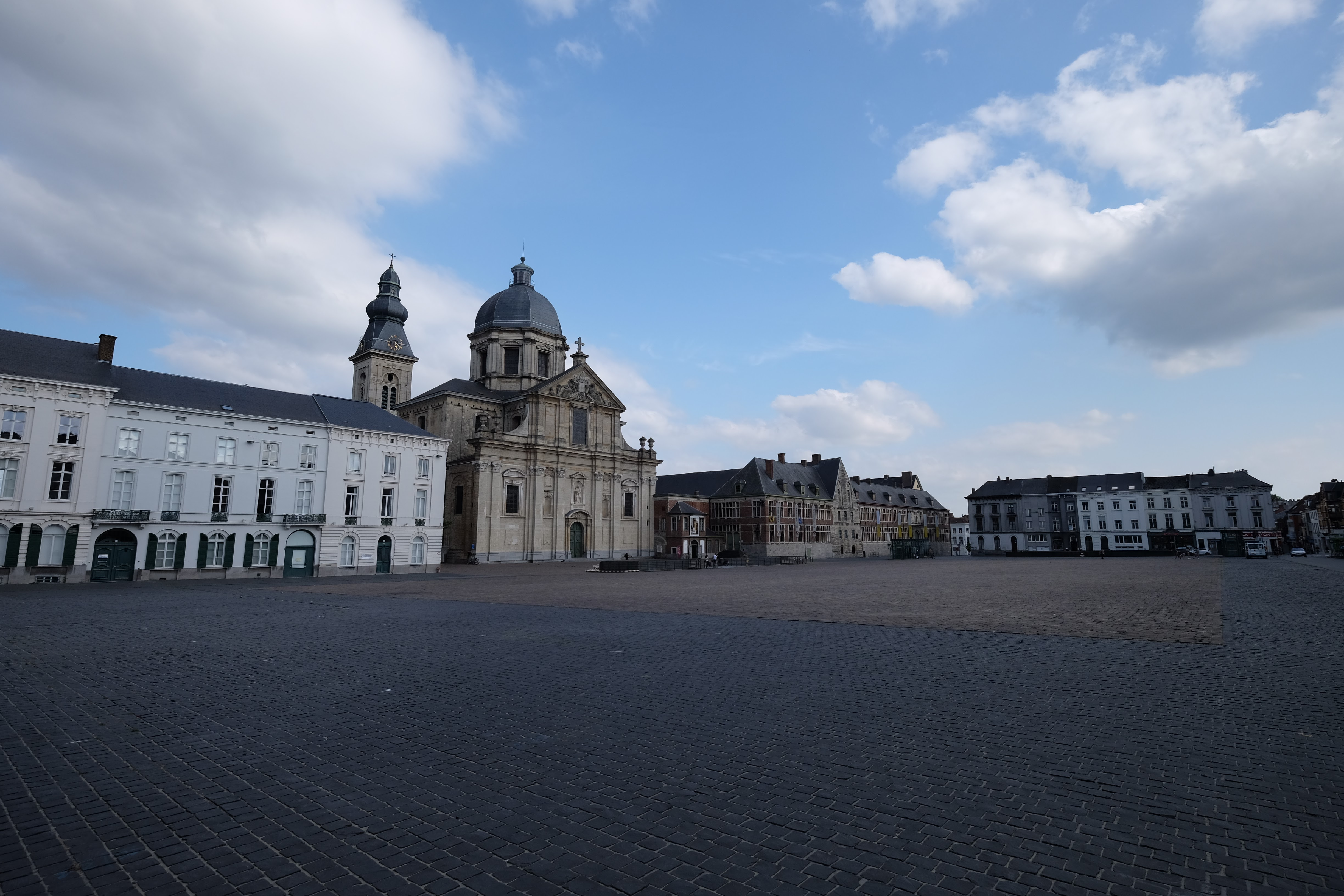 Ghent, Belgium